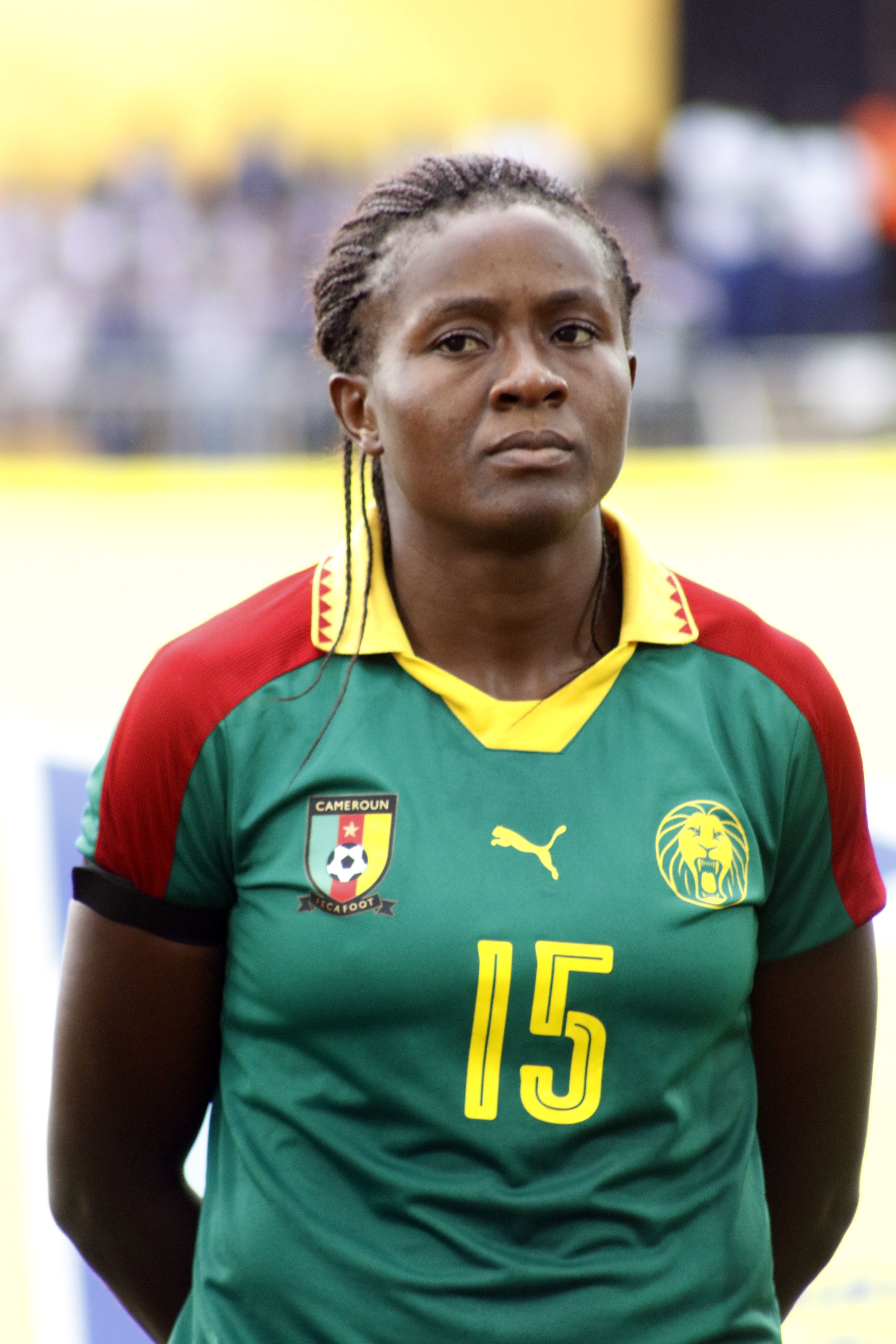 Défenseure de l'équipe nationale du Cameroun évoluant en première division camerounaise dans l'équipe Louves Minproff de Yaoundé